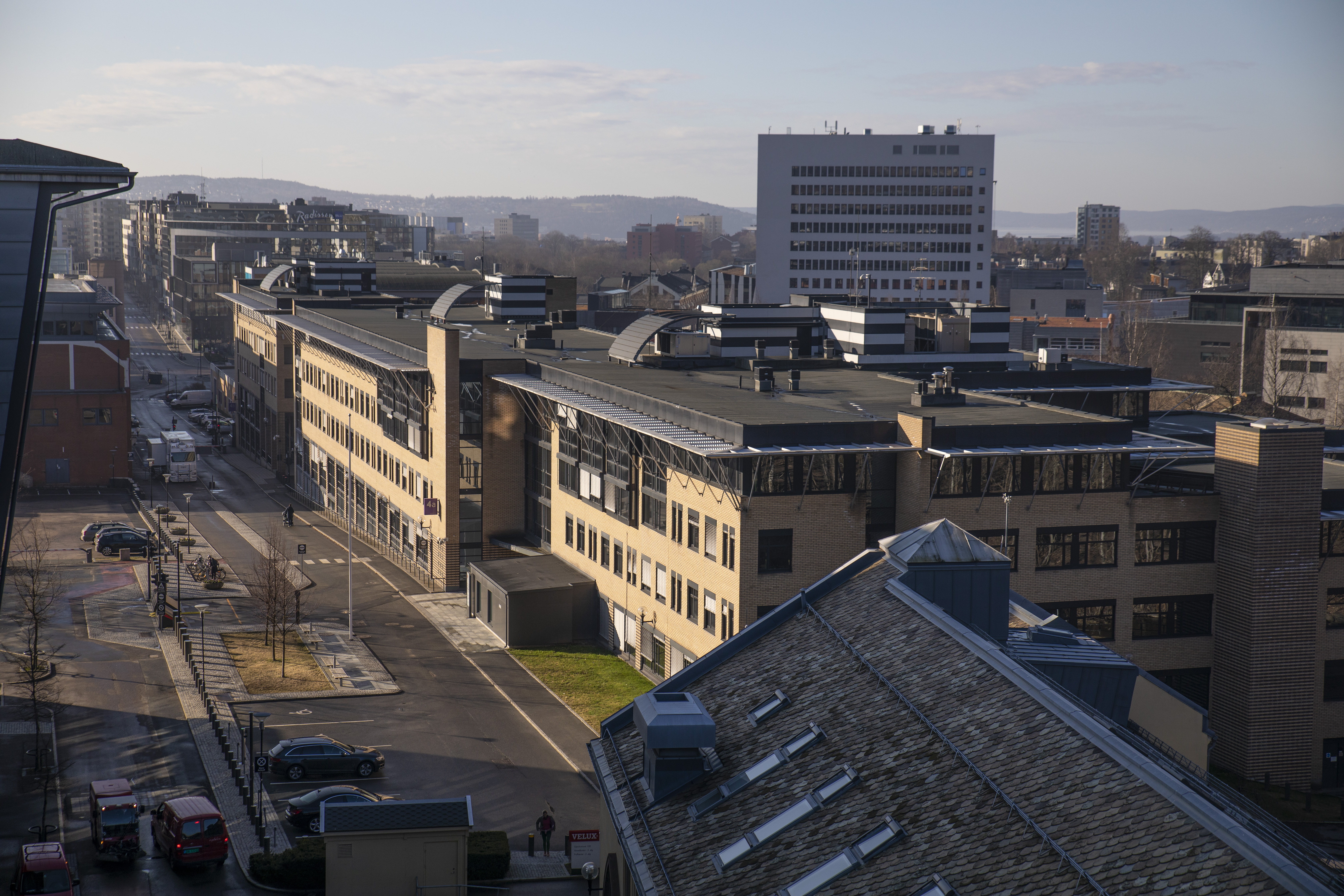 Justis- og beredskapsdepartementet sine kontorer i Nydalen i Oslo